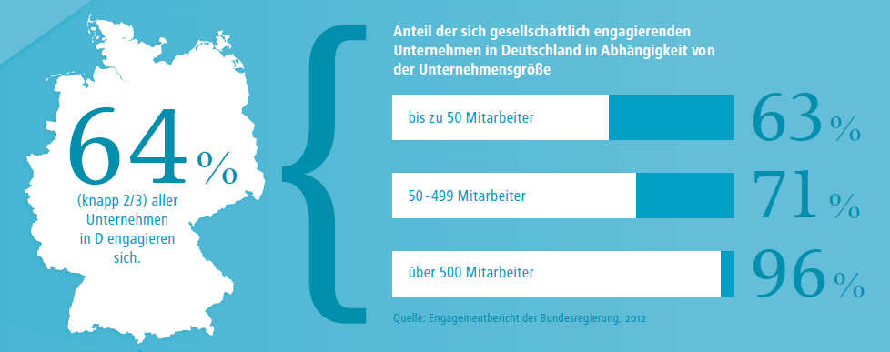 Anteil der sich gesellschaftlich engagierenden Unternehmen in Deutschland in Abhängigkeit von der Unternehmensgröße, 2012